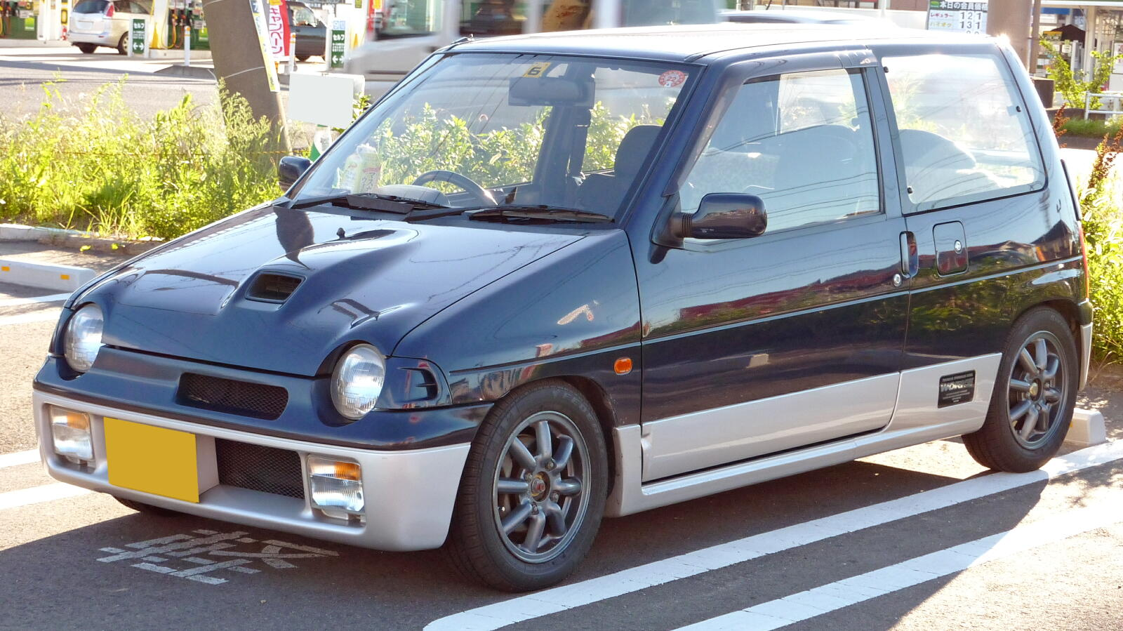 スズキ・アルトワークス（CA21S型）